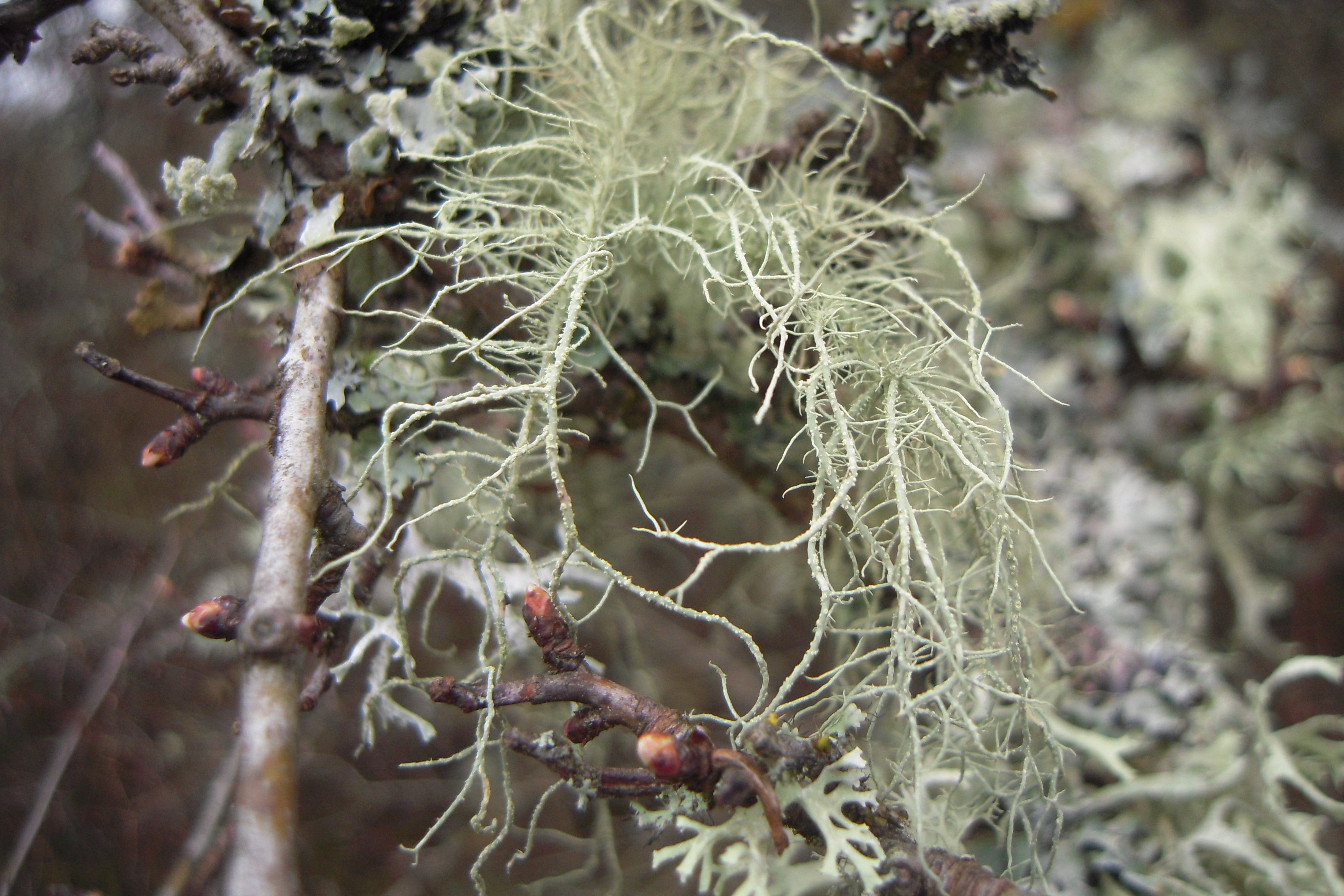 lichen